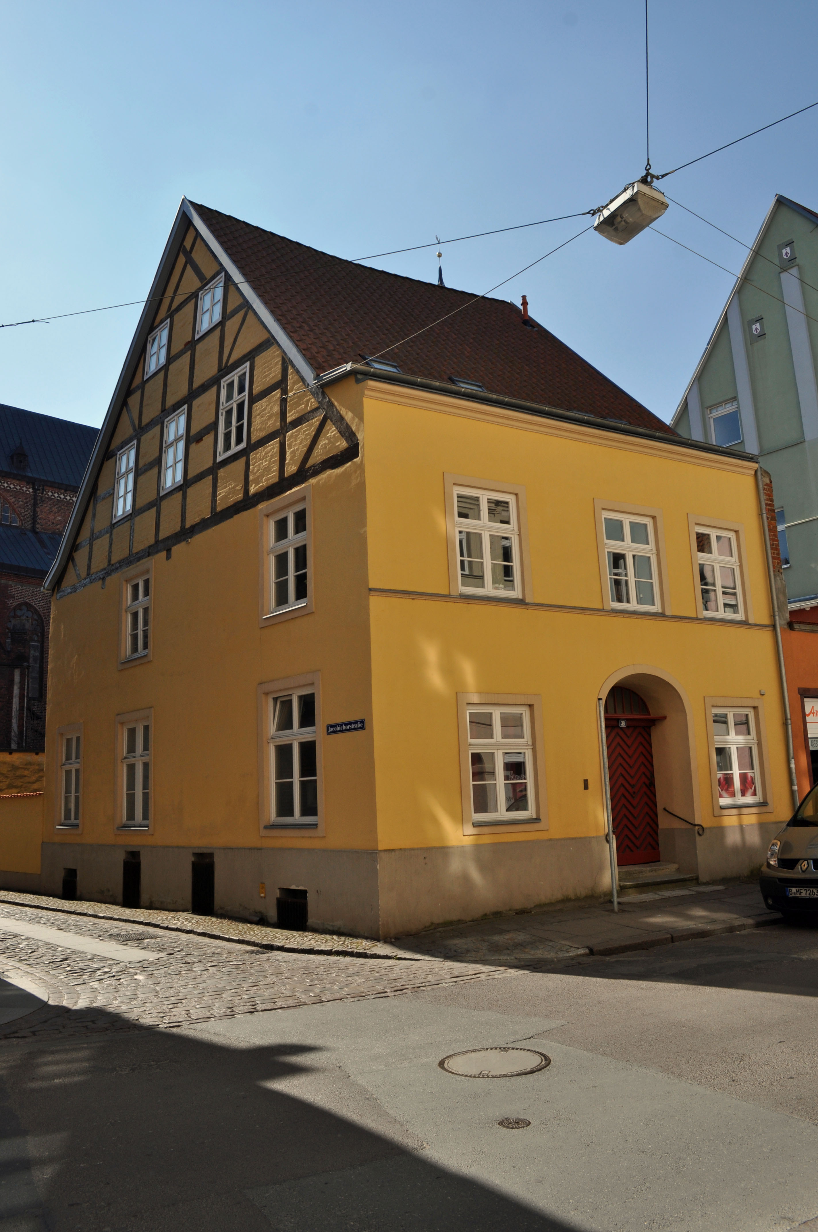 Gebäude bzw. Gebäudedetail in Stralsund. Straße und Hausnummer siehe Dateiname.